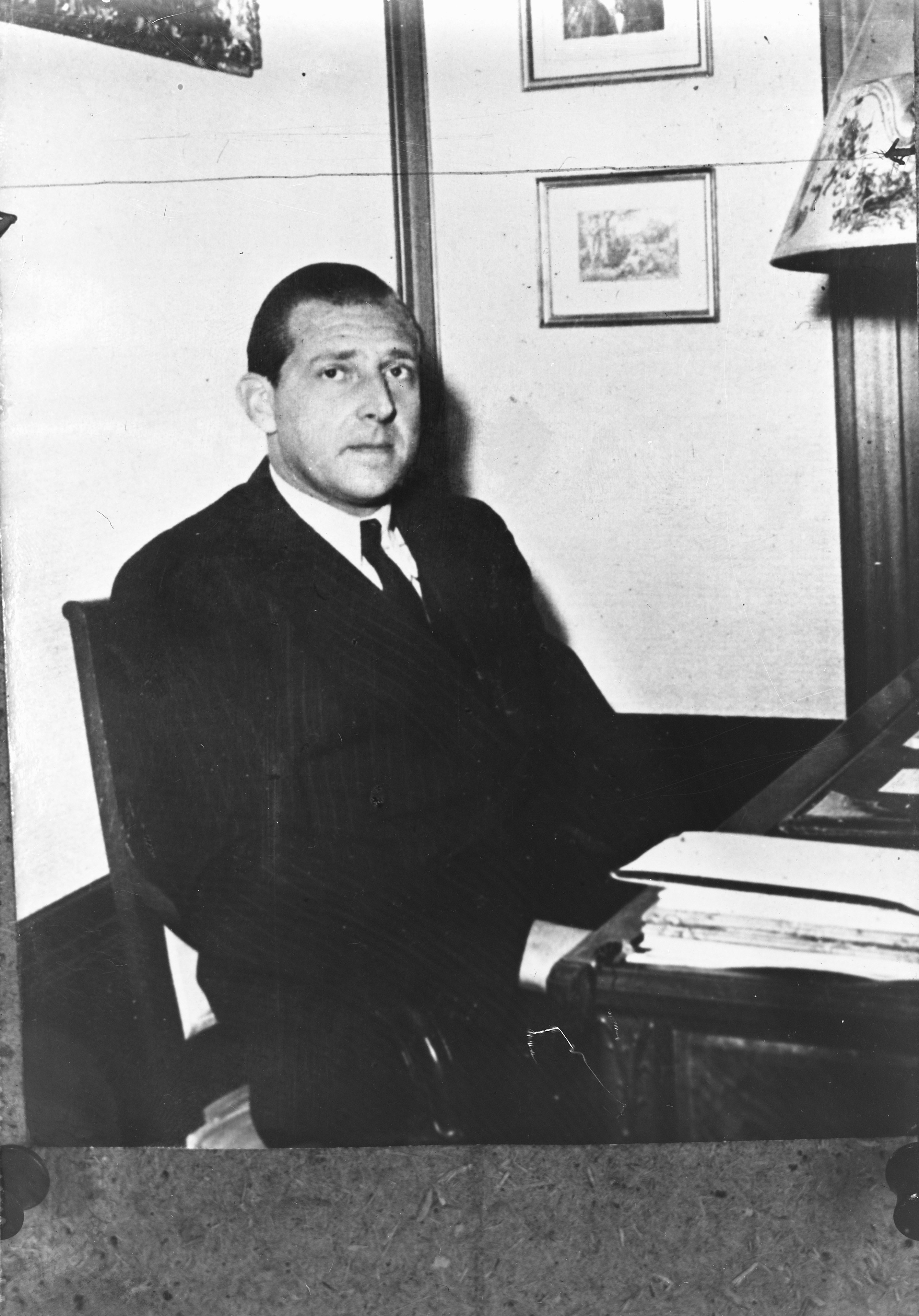 Juan de Bourbon , de Spaanse kroonpretendent